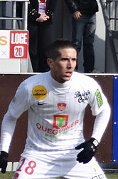 Match de football (Ligue 1) entre le Stade brestois 29 et l'Olympique lyonnais, le 3 mars 2013